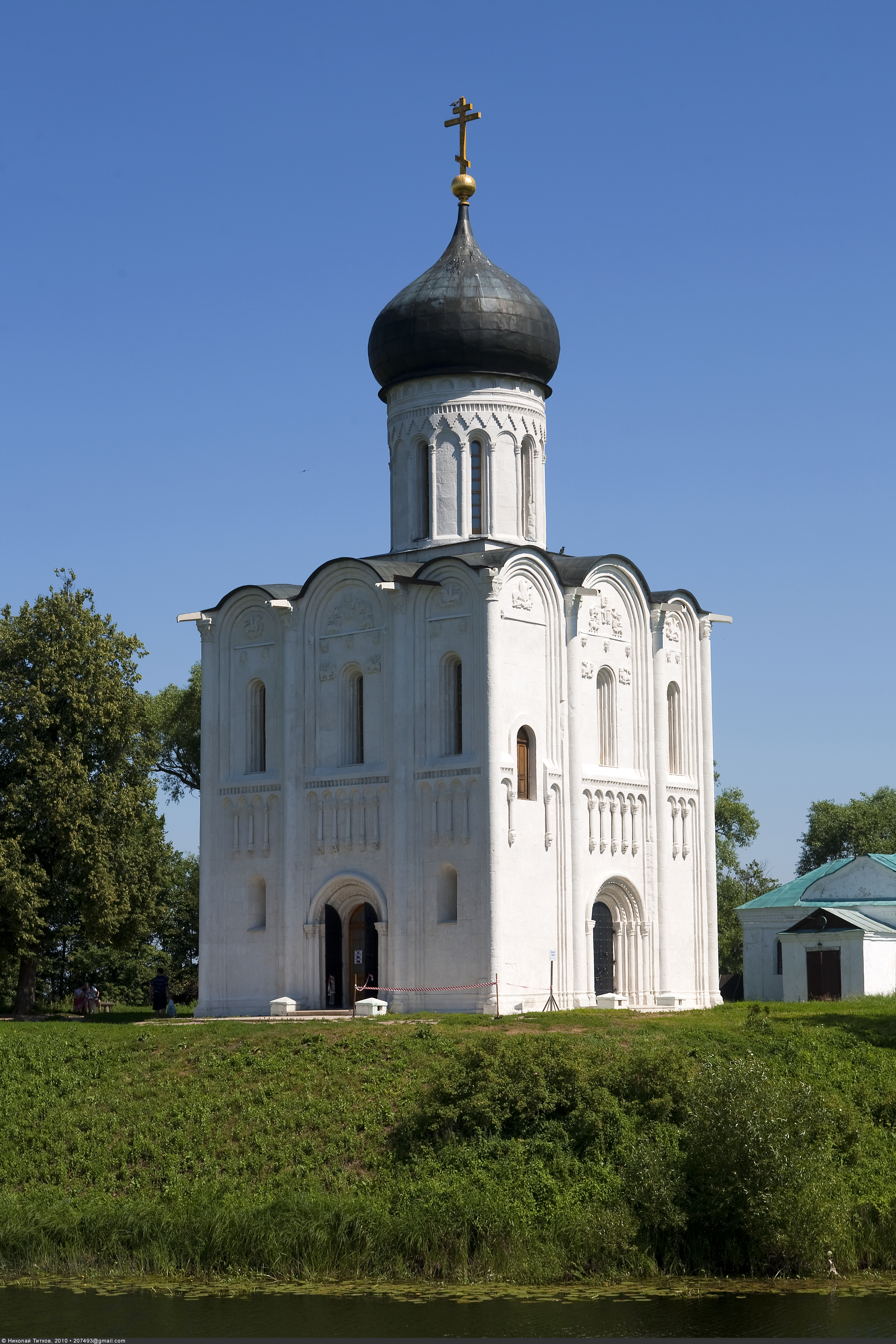 Покров на Нерли — четырёхстолпный, трёхапсидный, одноглавый храм, построенный из белого камня высочайшего качества (кладка весьма однородна, в ней практически отсутствует желтоватый оттенок, пористость блоков очень низка). В сводах для их облегчения применён туфообразный известняк. Храм стоит на уникальном фундаменте, состоящем из восьми рядов качественного гладкотёсаного белого камня (в целом около 4 метров глубиной), базирующихся на обычной для суздальского зодчества бутовой основе, почти квадратной в разрезе (глубиной около 2 метров). Дата постройки — 1165 год — оспаривается многими исследователями.